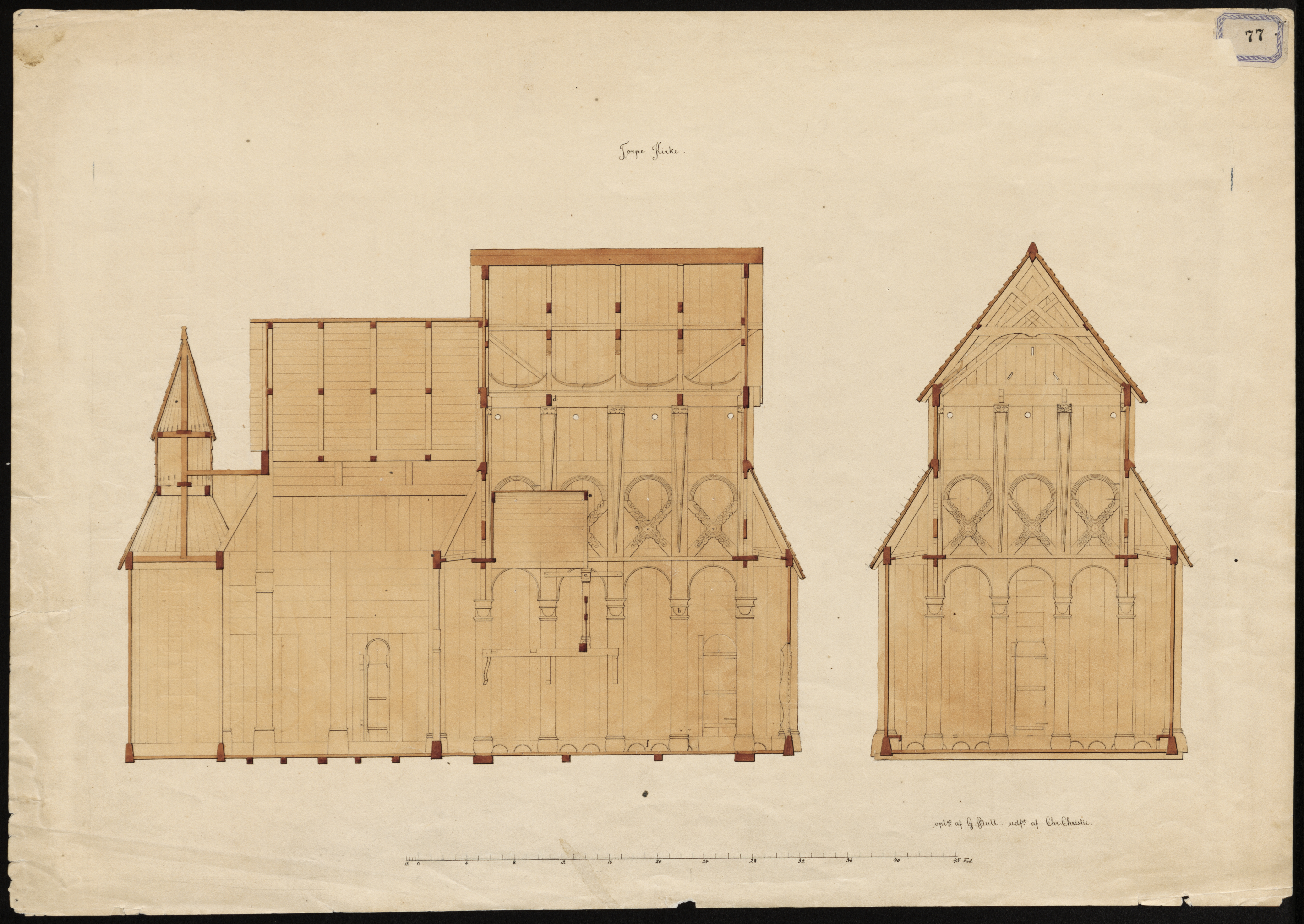 Bildet er hentet fra Riksantikvaren. Langsnitt og tverrsnitt. FFnr 77 Eier : Fortidsminneforeningen Sted : Norway, Buskerud, Ål Emneord: STAVKIRKER Medium : "Tusj;Akvarell"